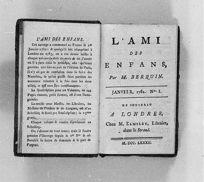 Les Ami des Enfans